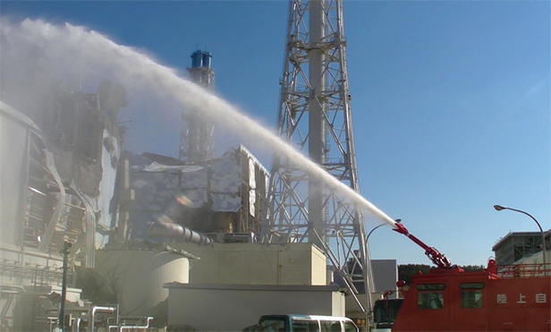 福島第一原発3号機原子炉への注水